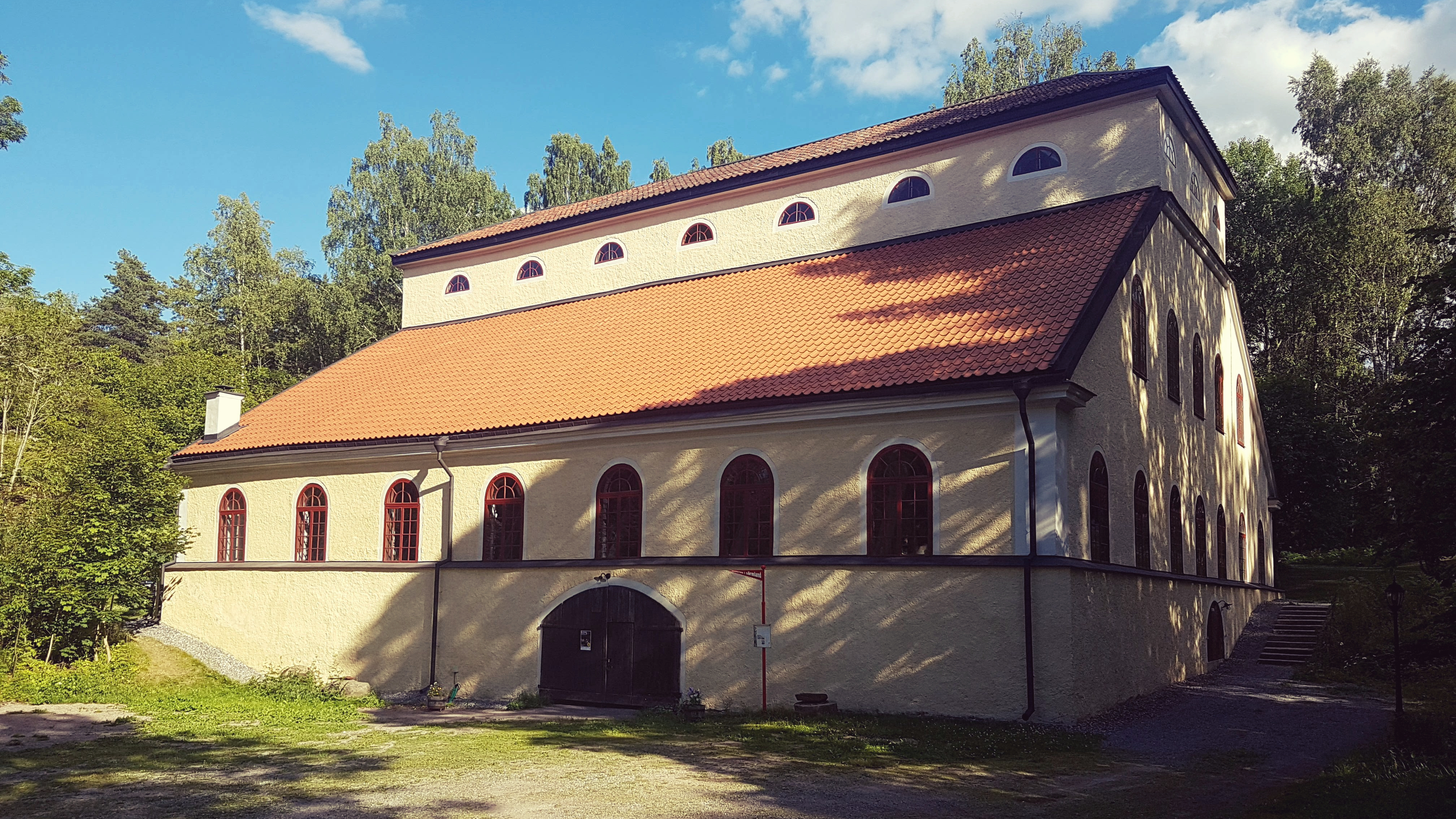 Björndammens masugn i Dunkers socken, Södermanland.